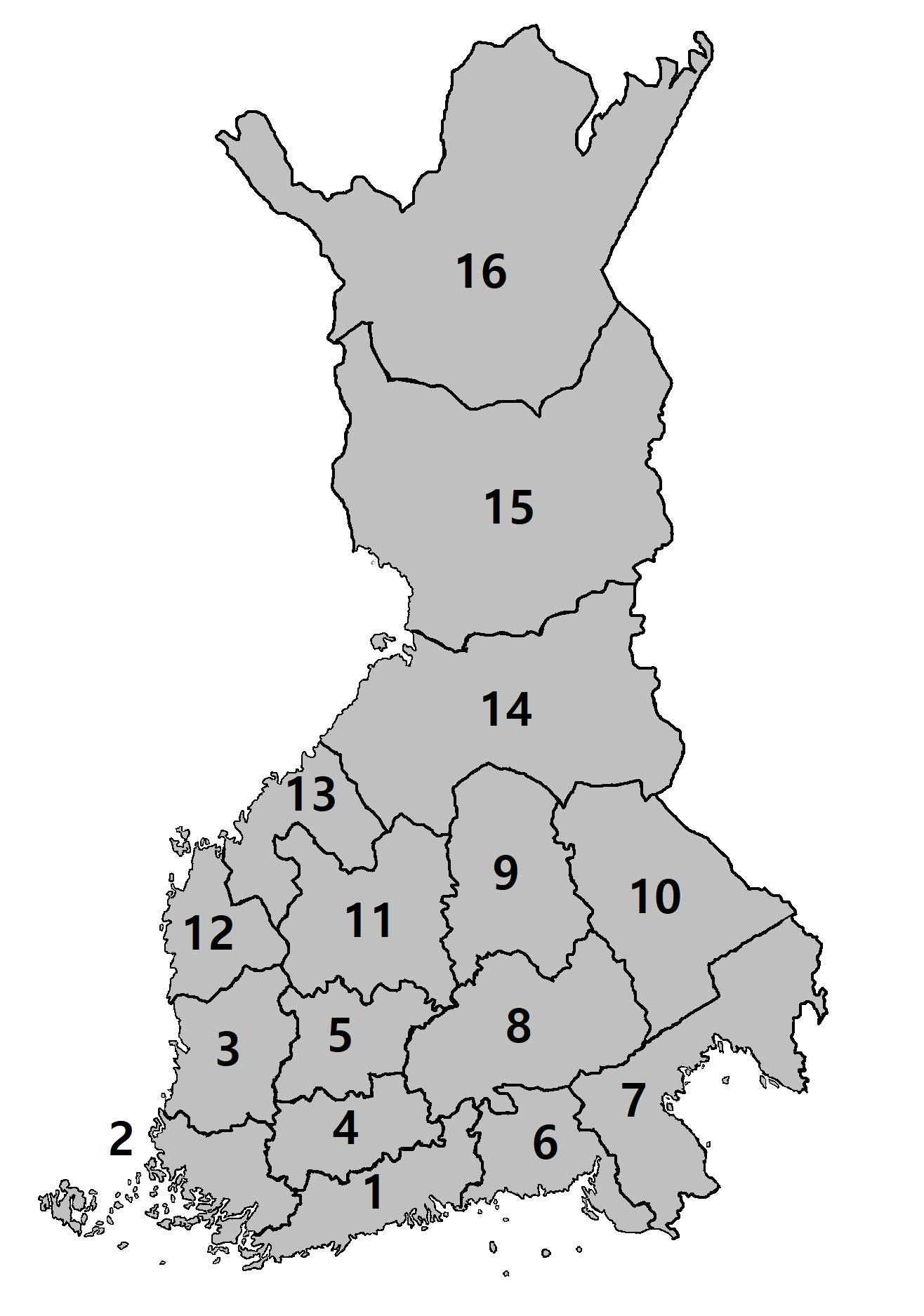 Suomen vaalipiirit 1930